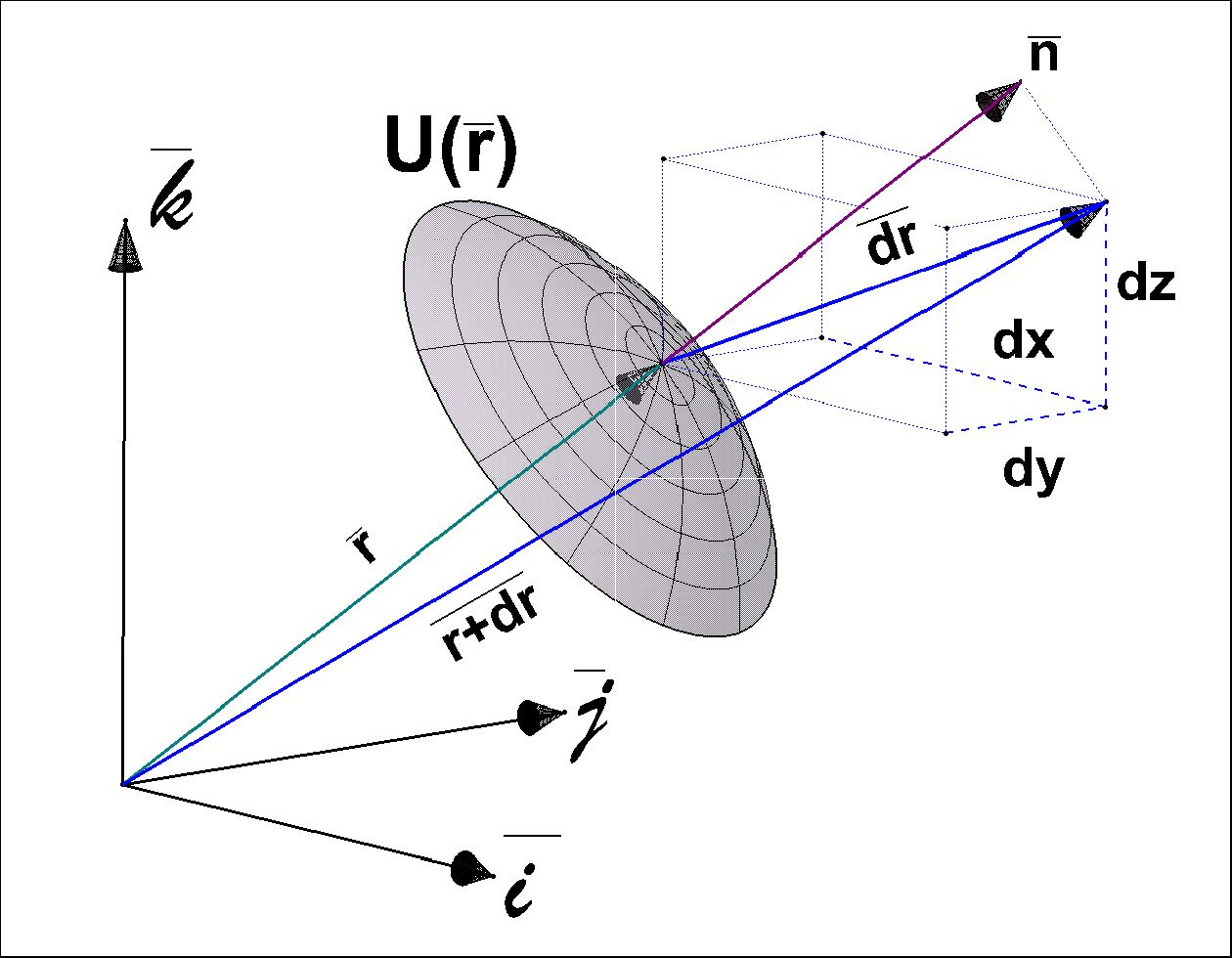 Skizze zur mathematischen Herleitung Gradient